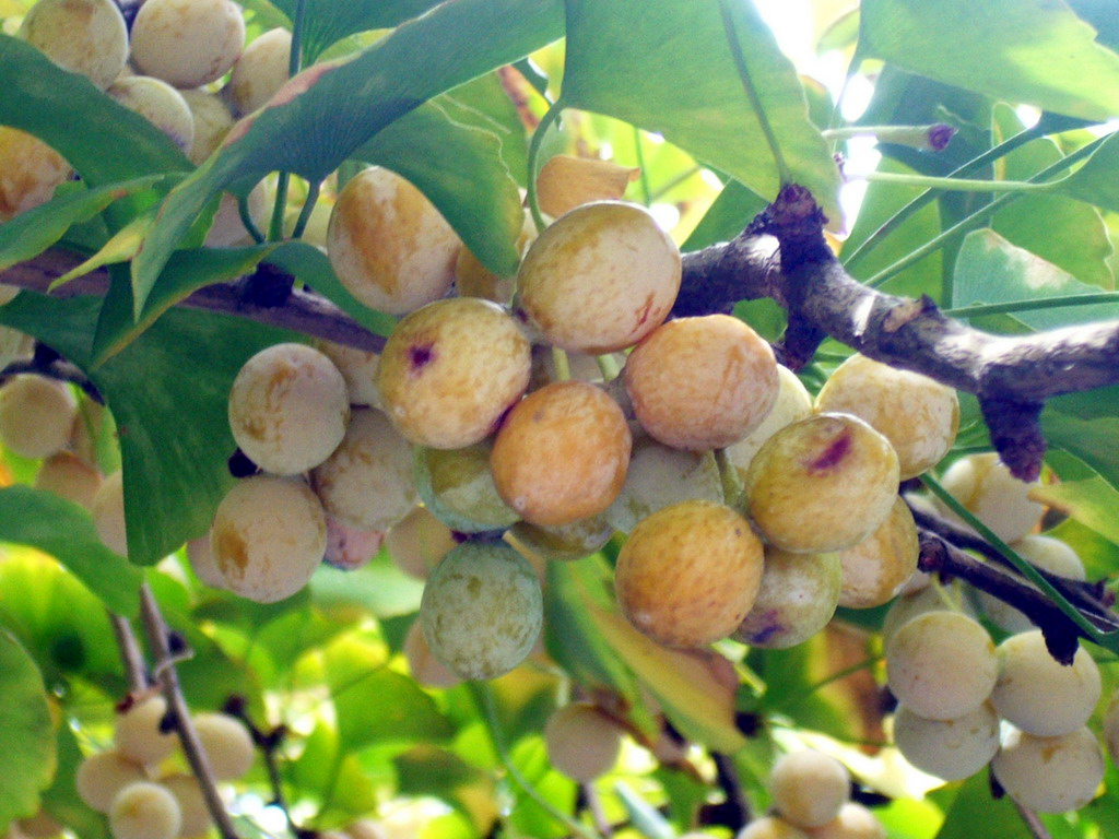 Ginkgo biloba - in China